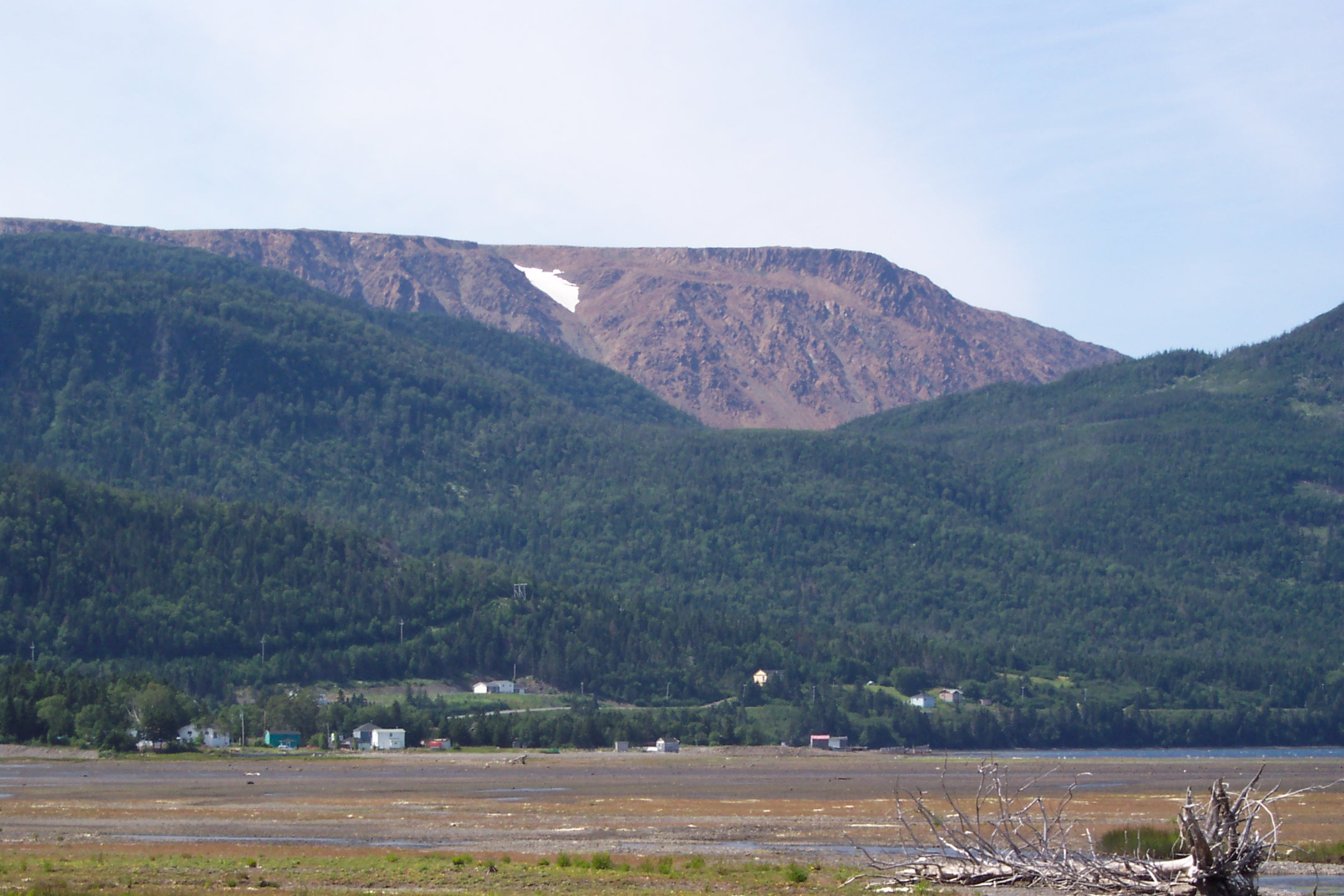 Tablelands taken from Glenburnie